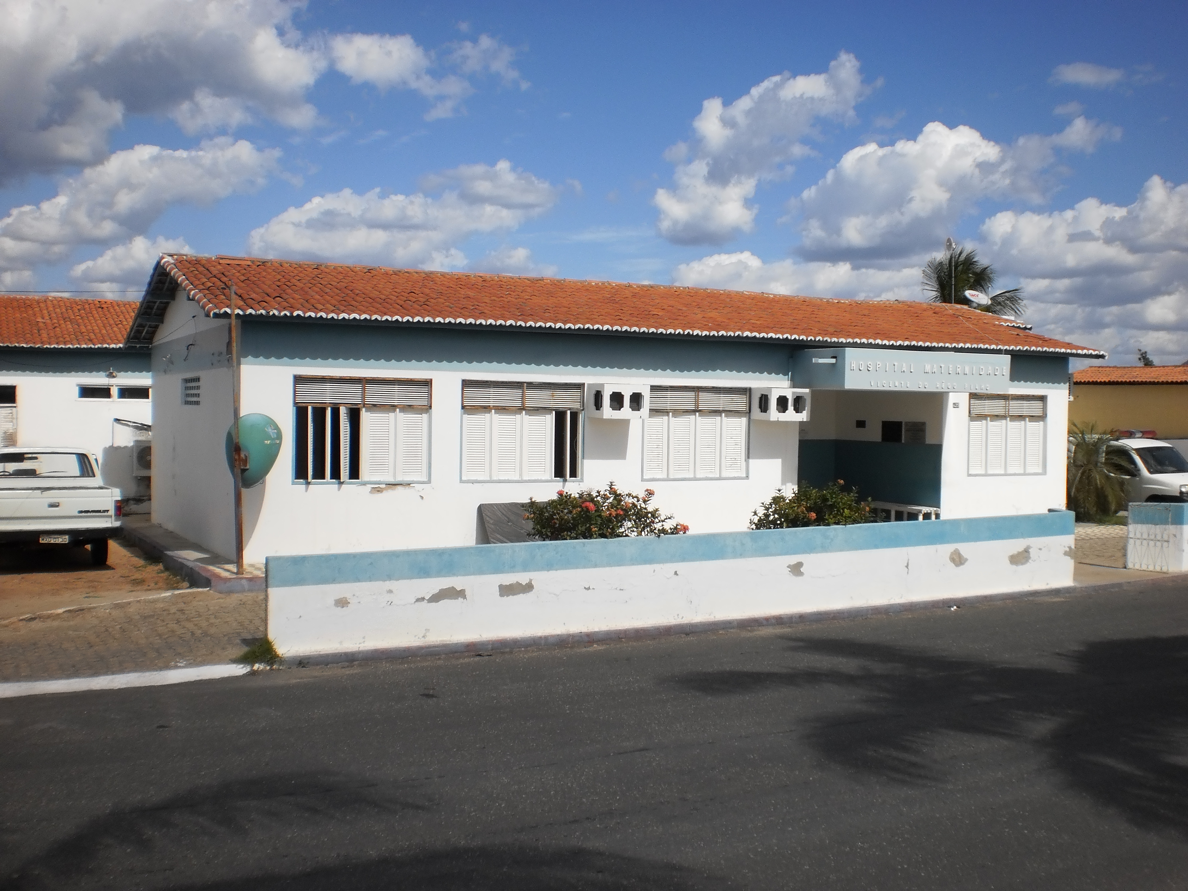 Hospital Maternidade "Vicente do Rêgo Filho" em Riacho da Cruz, Rio Grande do Norte, Brasil.